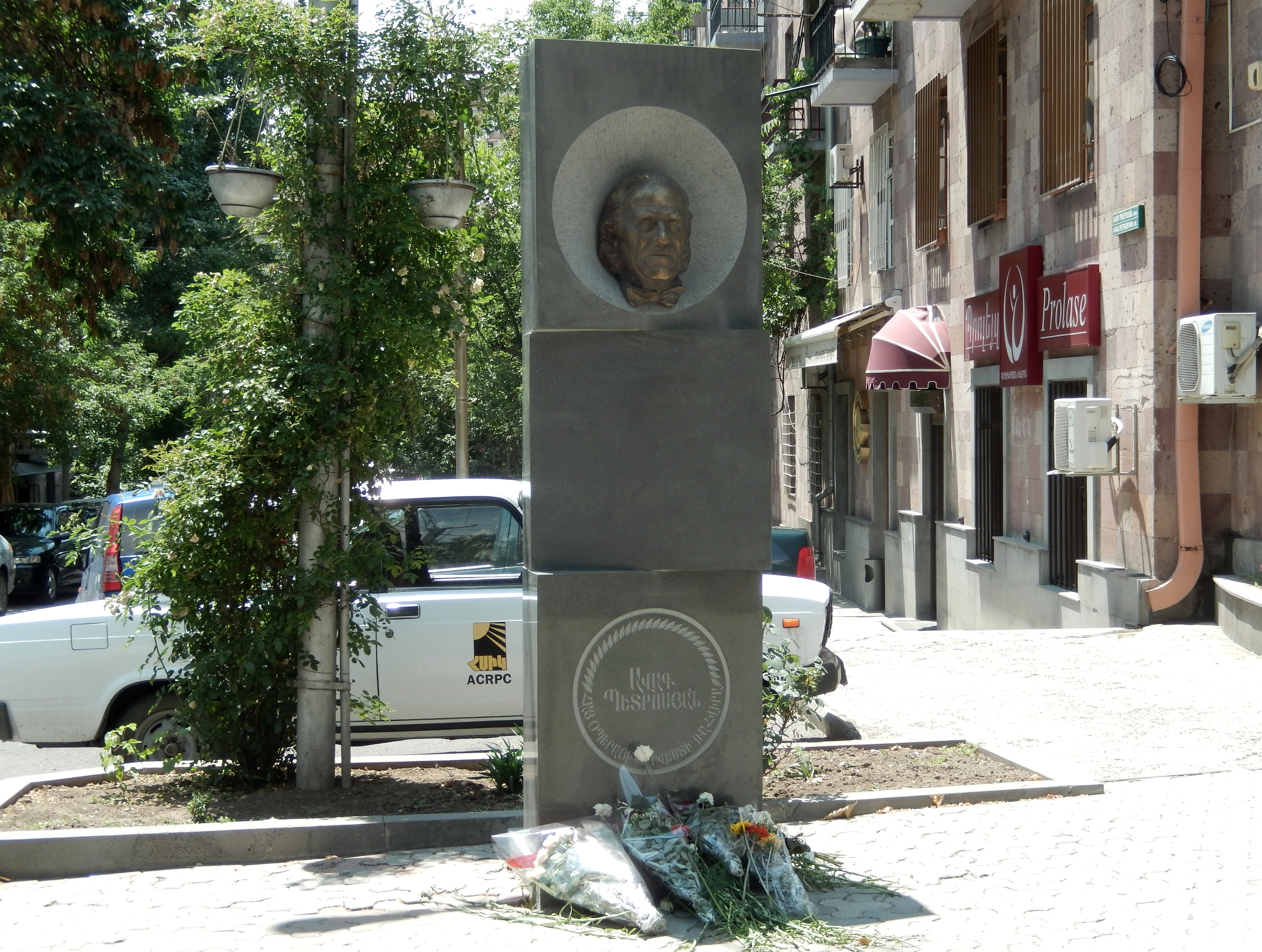 Ավագ Պետրոսյանի հուշարձանը